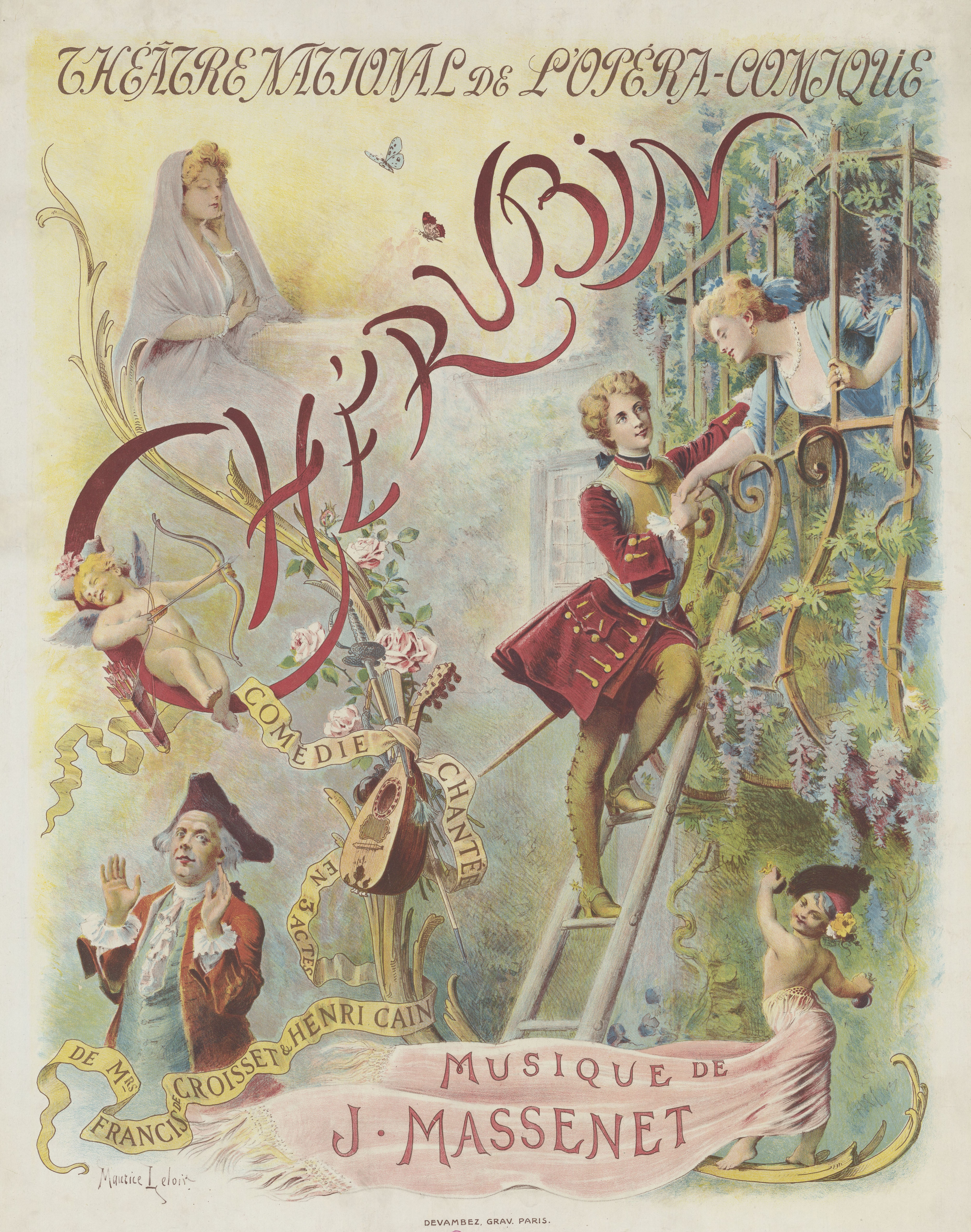 "Théâtre de l'Opéra-Comique. Chérubin. Comédie chantée en trois actes de Mrs Francis de Croisset et Henri Cain. Musique de J. Massenet : [affiche] / lithographie de Maurice Leloir" Poster for the première of Jules Massenet's opera Chérubin.